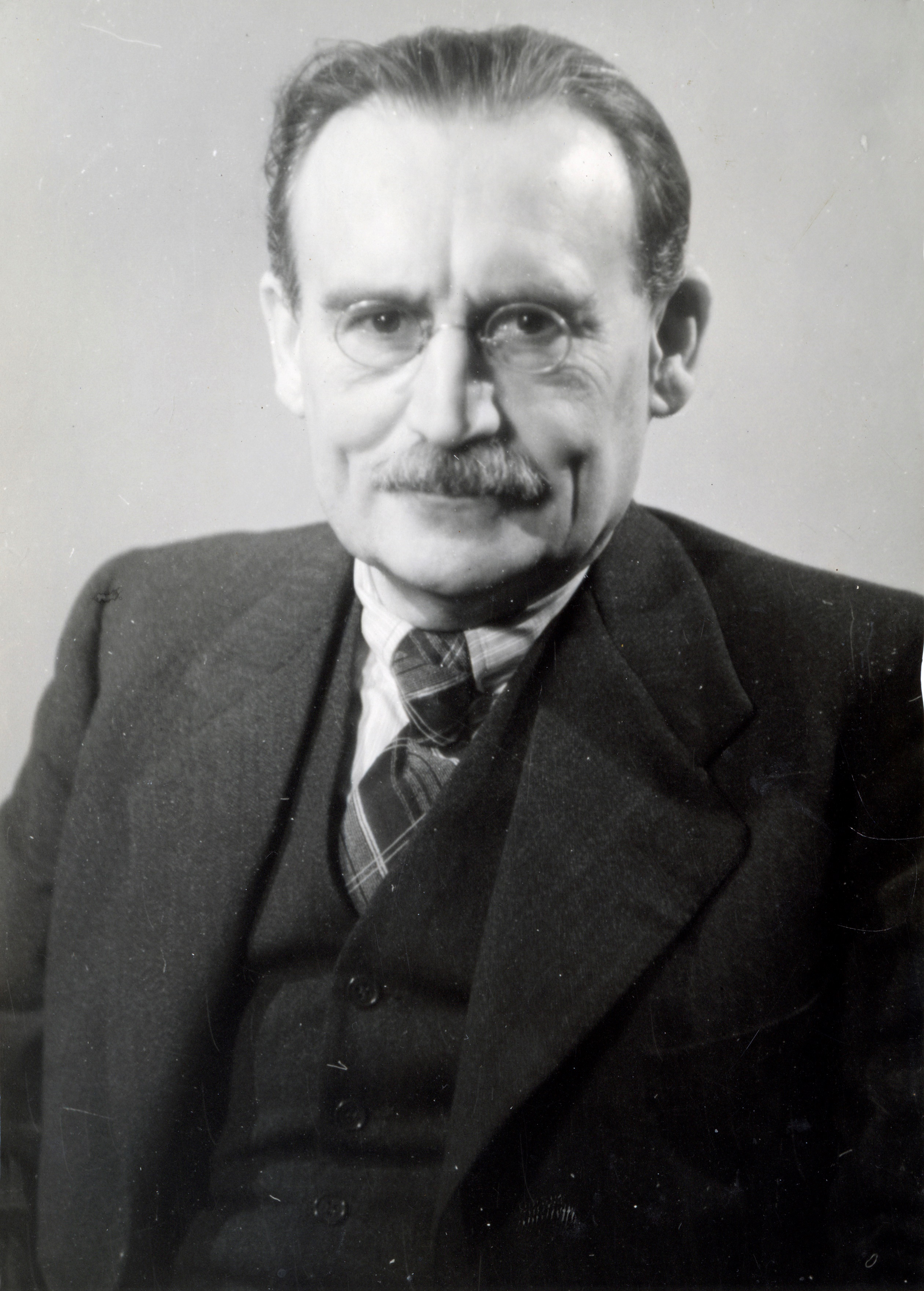 Portret van Willem Drees (SDAP / PvdA), minister-president. Nederland, datum onbekend.